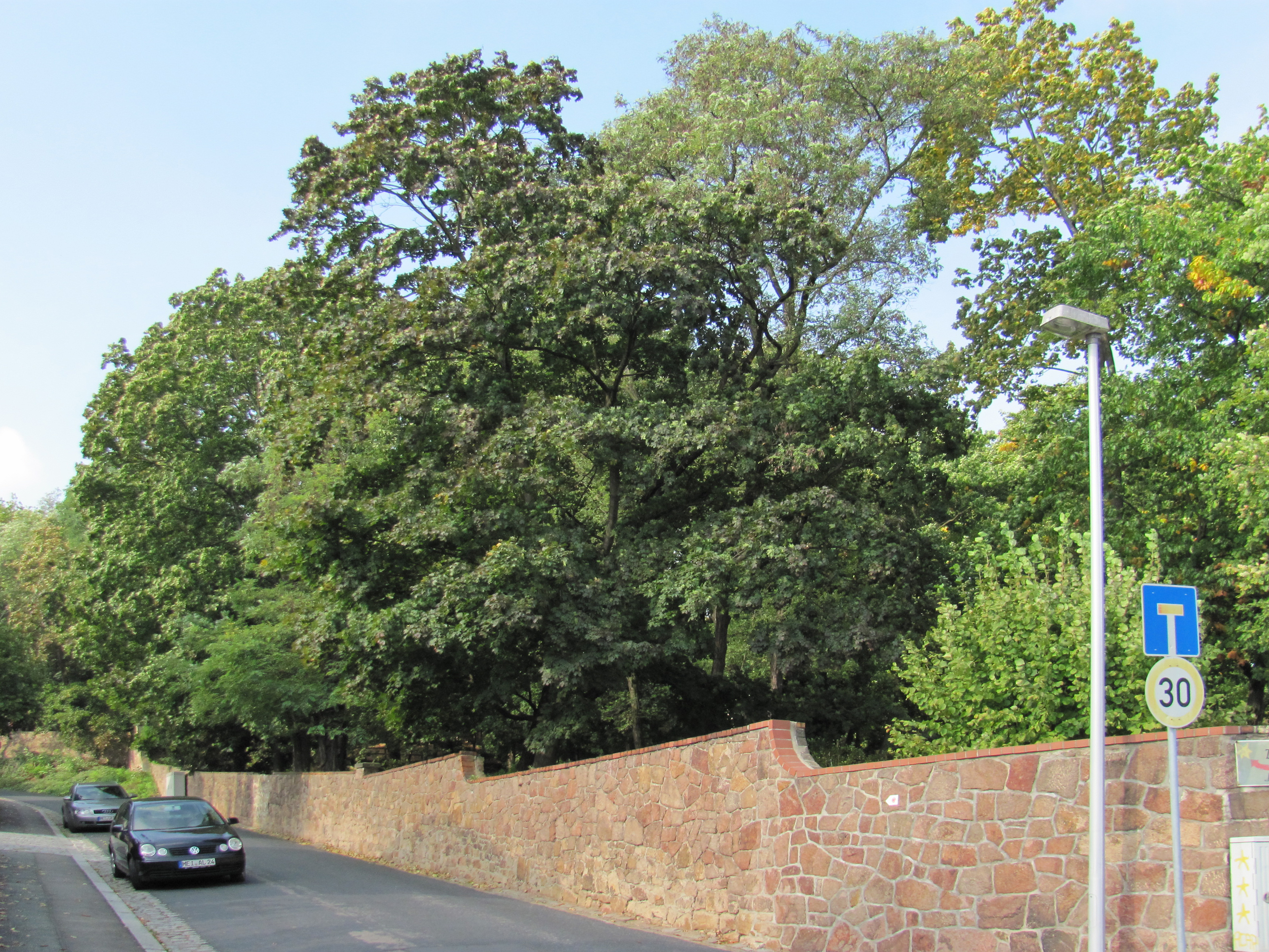 Radebeul-Niederlößnitz, Mohrenhaus, Park